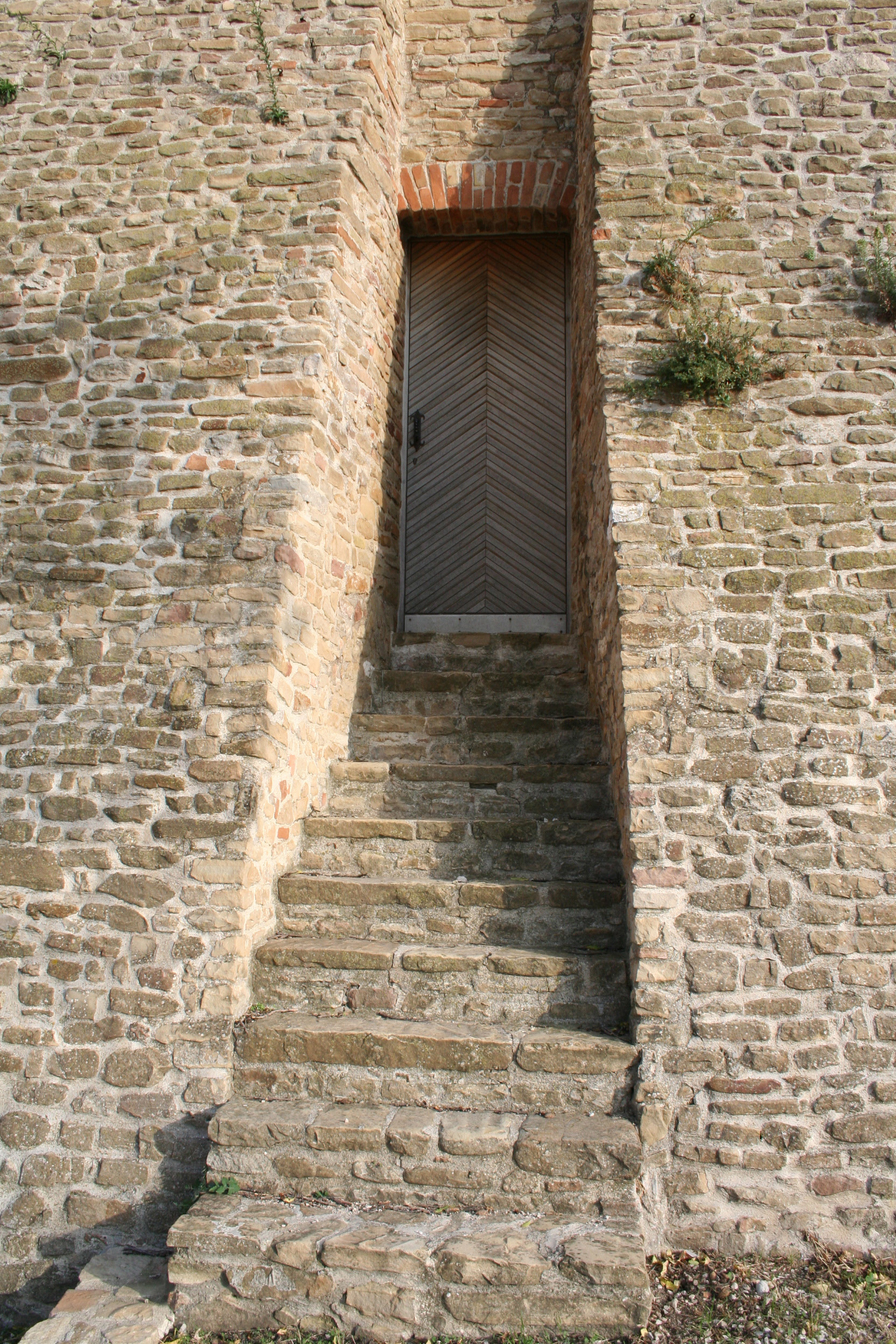 Rampa della scala di ingresso alla Torre di Montegualtieri in provincia di Teramo